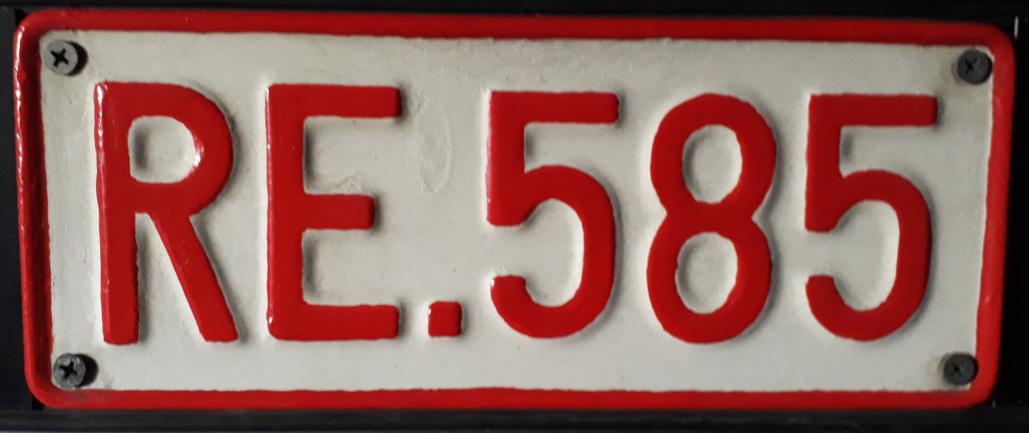 Ontbrekende foto op Plaat wordt binnen enkele dagen geschrapt bij DIV wegens aankoop nieuwe wagen. Op deze manier kan ik mijn " eerste plaatje " vereeuwigen.